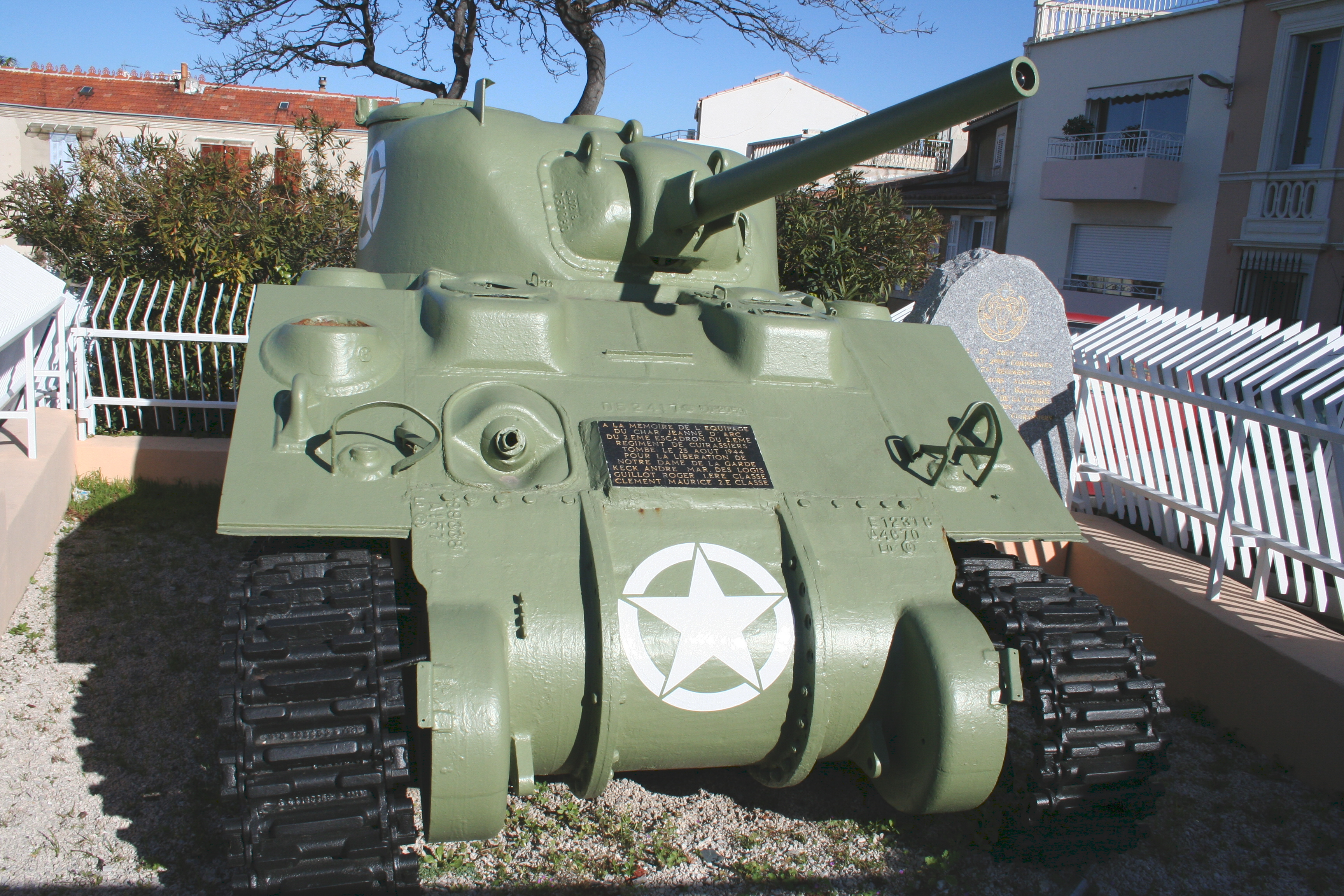 Char Jeanne d'Arc détruit lors de la Libération de Marseille le 25 août 1944 lors de l'assaut de la coliine de la Vierge de la Garde. Il se trouve place du colonel Edon.